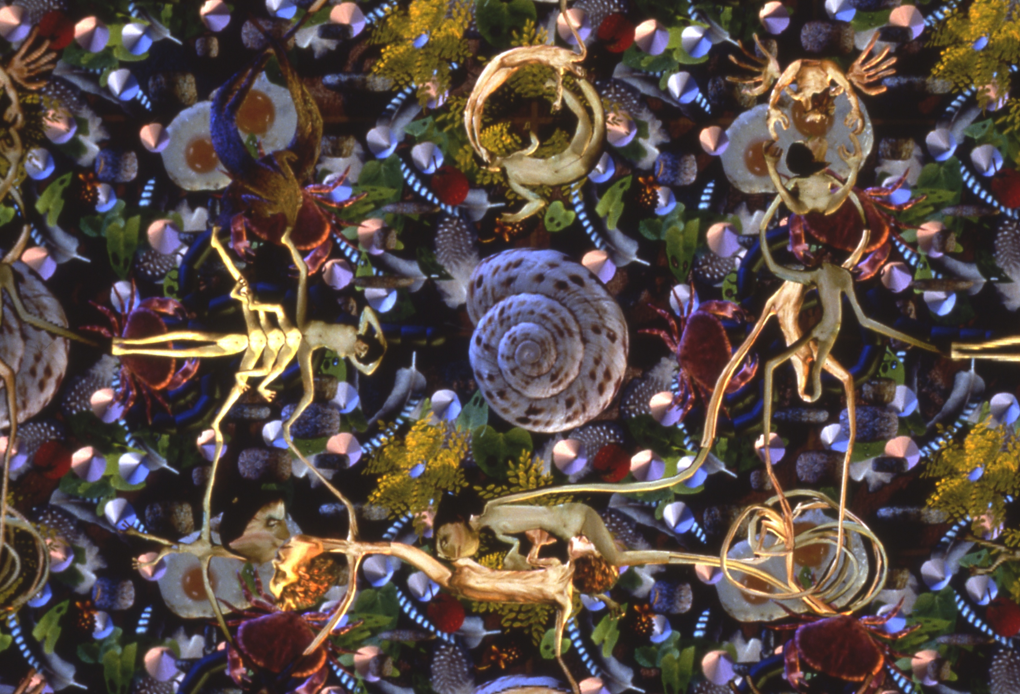 Image extraite de Tableau d'amour, film d'animation de Bériou.